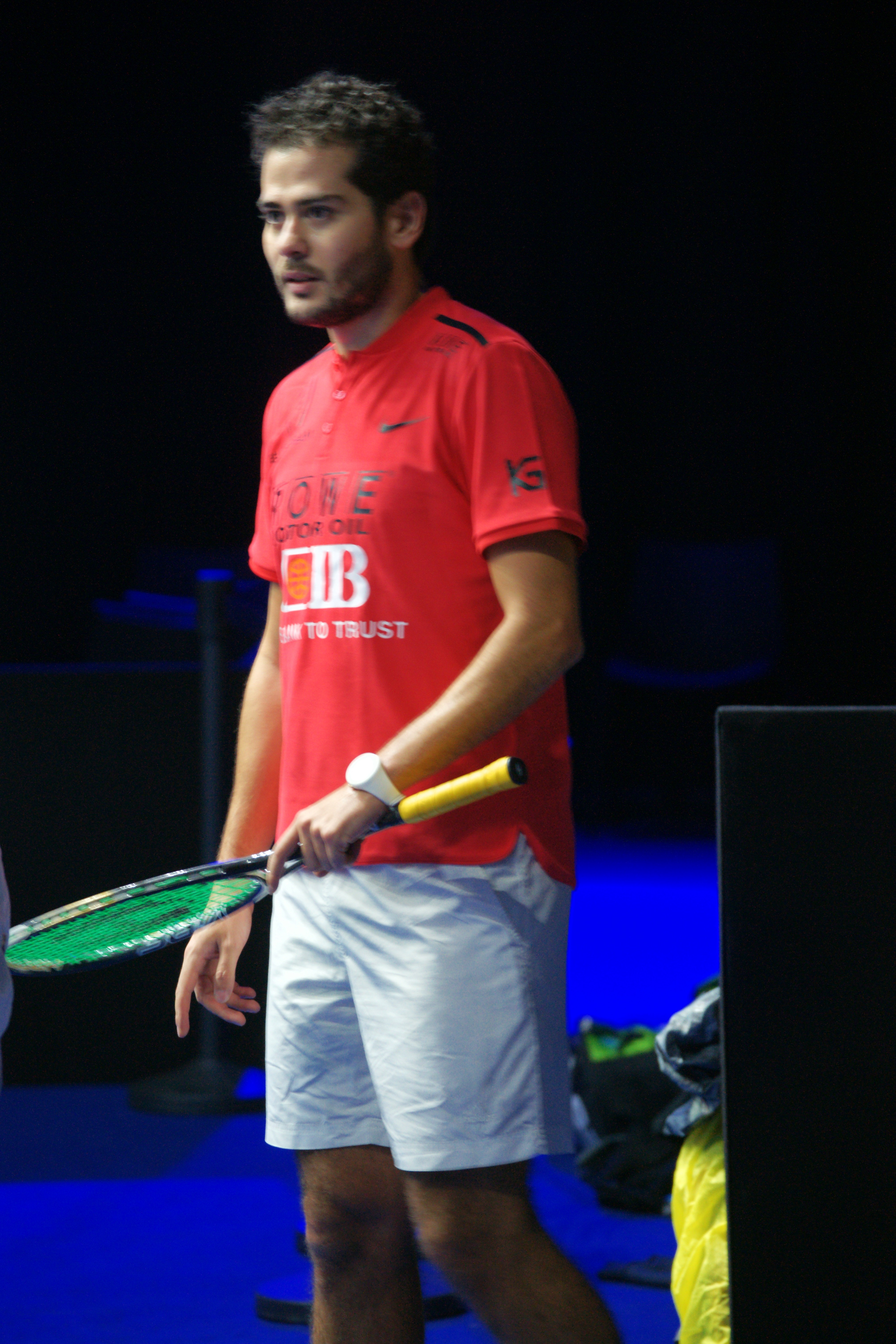 championnats du monde de squash par équipe Marseille 2017